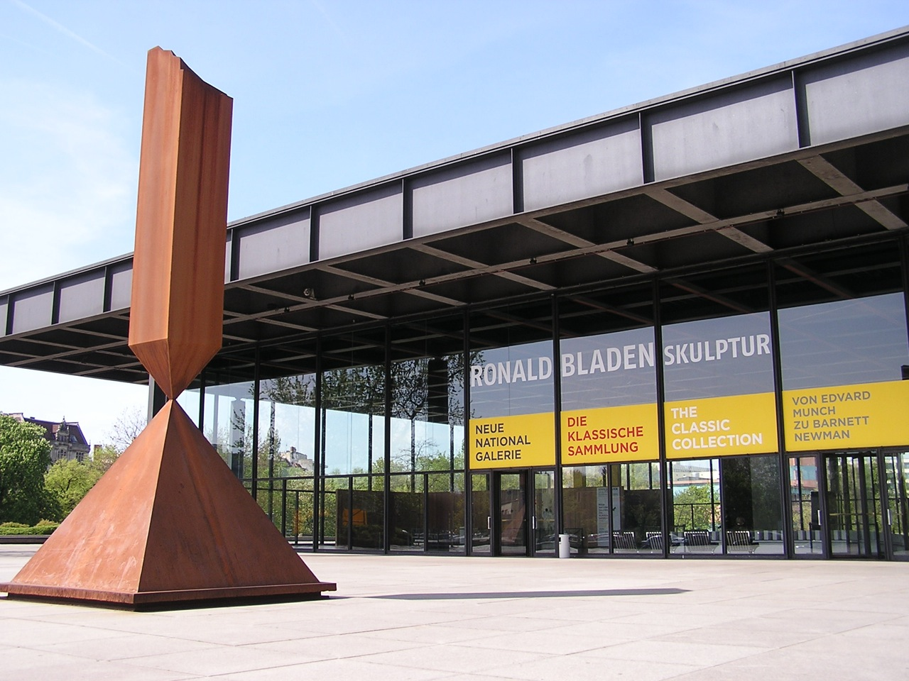 Nová národní galerie v centrální části Berlína